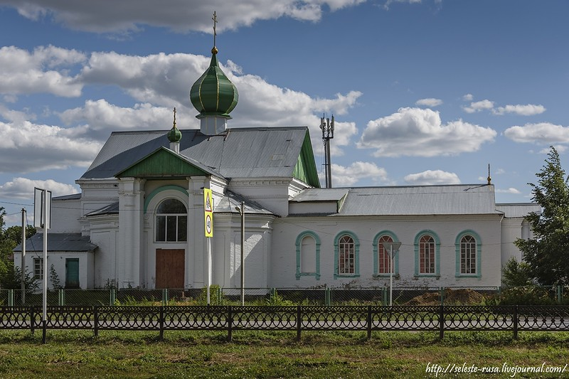 Храм во имя Святой Троицы в селе Елховка Самарской области